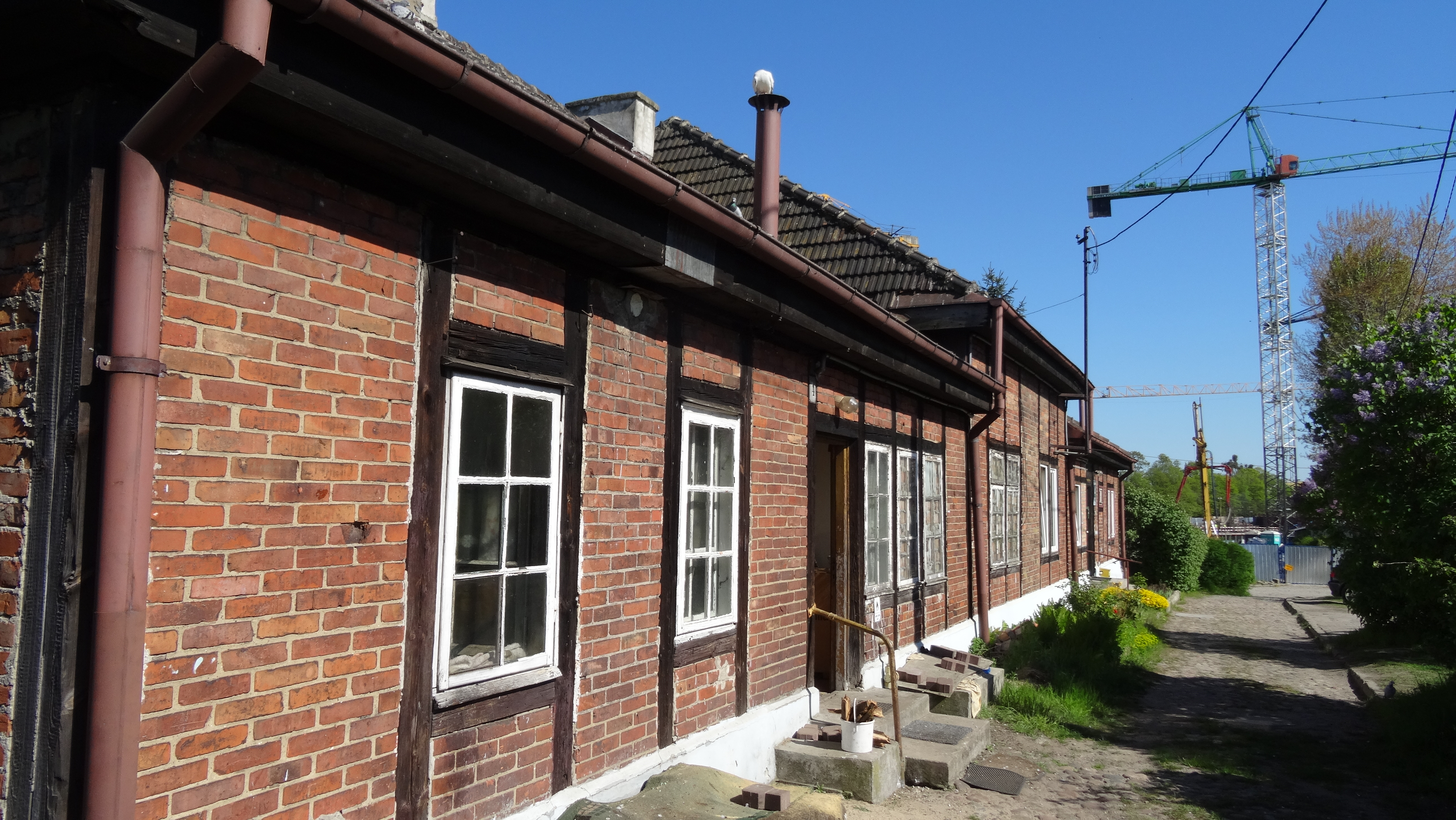 Dom przy ul. Nad Stawem 4 na terenie "Indiańskiej Wioski" w Gdańsku Wrzeszczu.